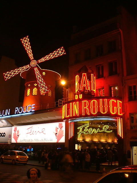 Moulin Rouge at night, Paris, Francevùlevùcuscèavecmuà